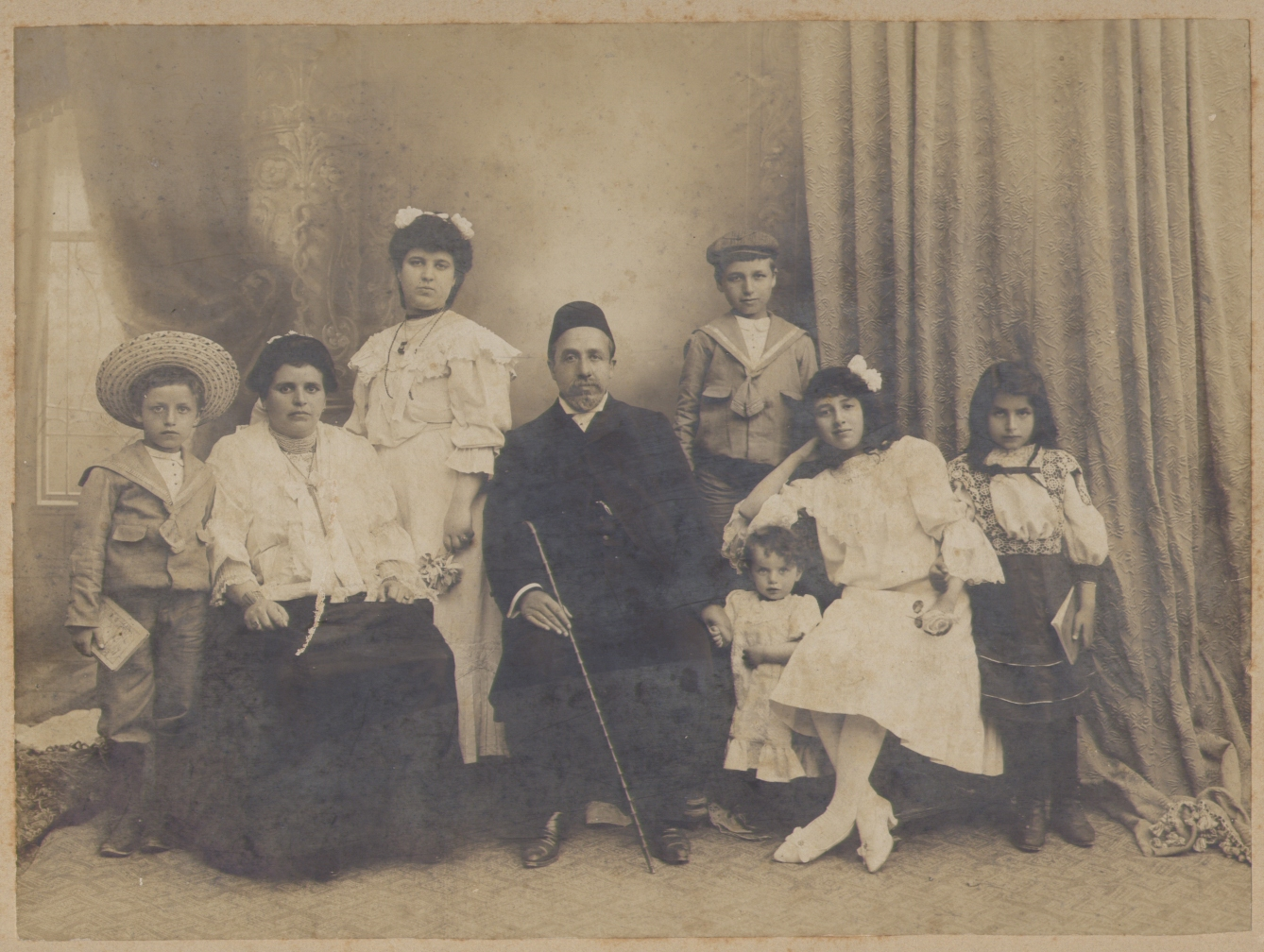 Judge Malkiel Mani and his family in Jerusalem, in the end of the first decade of the 20th century. From right to left: Layla, Julia, Zamira, Morad, Malkiel, Mazal (standing), Rahel and Rephael